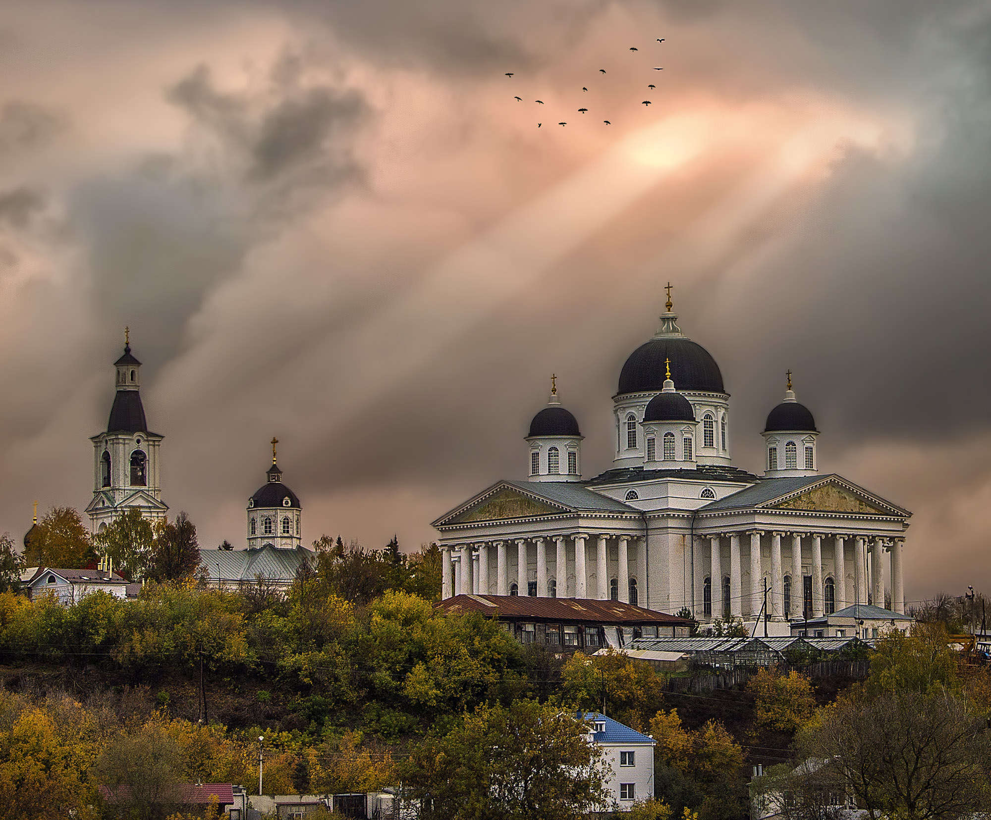 собор Воскресенский (Спасский) (Нижегородская область, Арзамас, Соборная площадь, стр. 19)